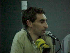 Fernando Escartín en un acto público de Fuerteventura en el año 2000